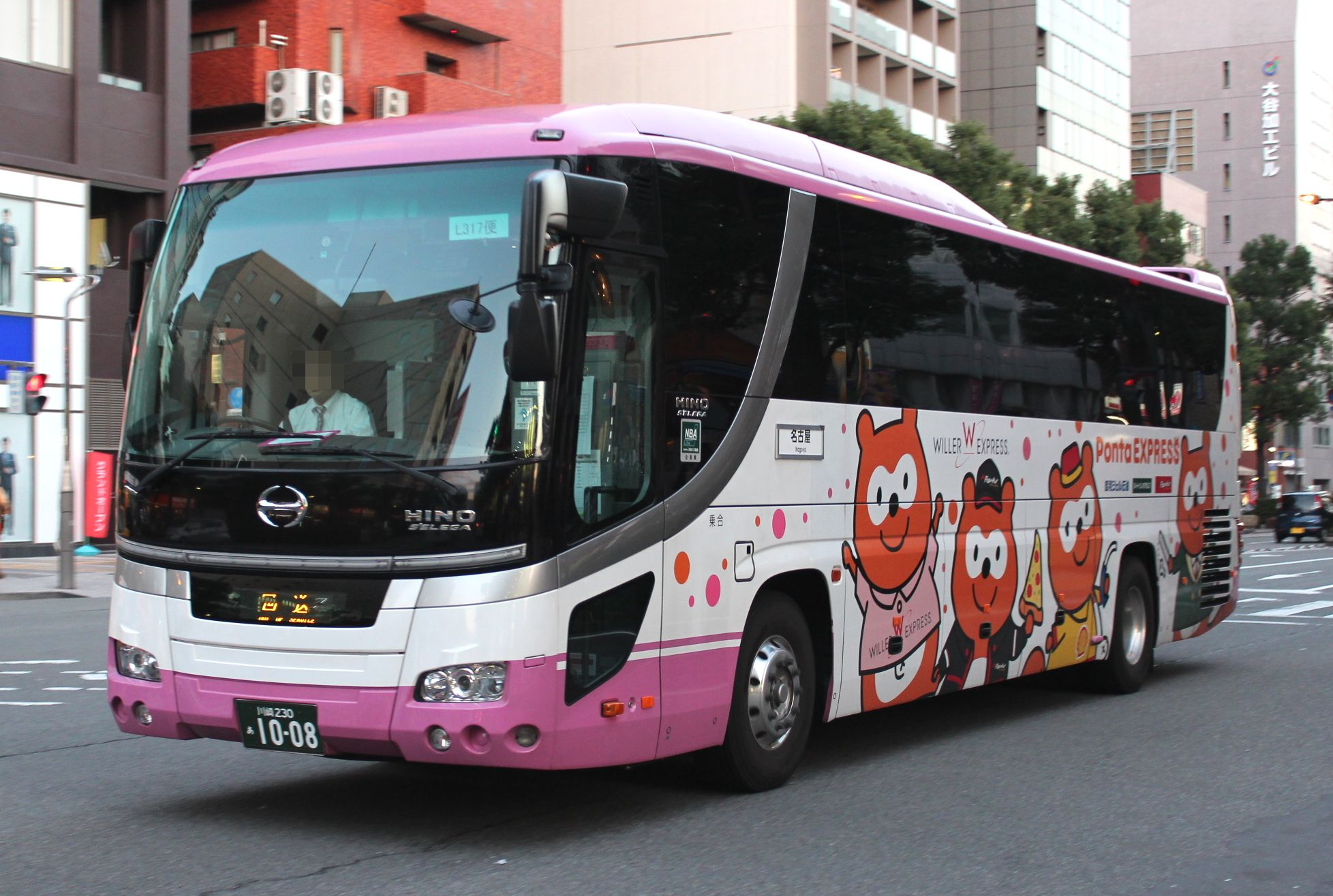 WILLER TRAVELの車両